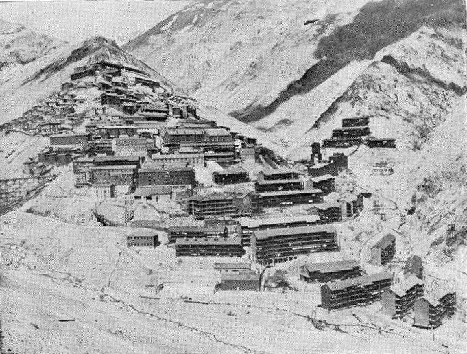 Vista general de Sewell.